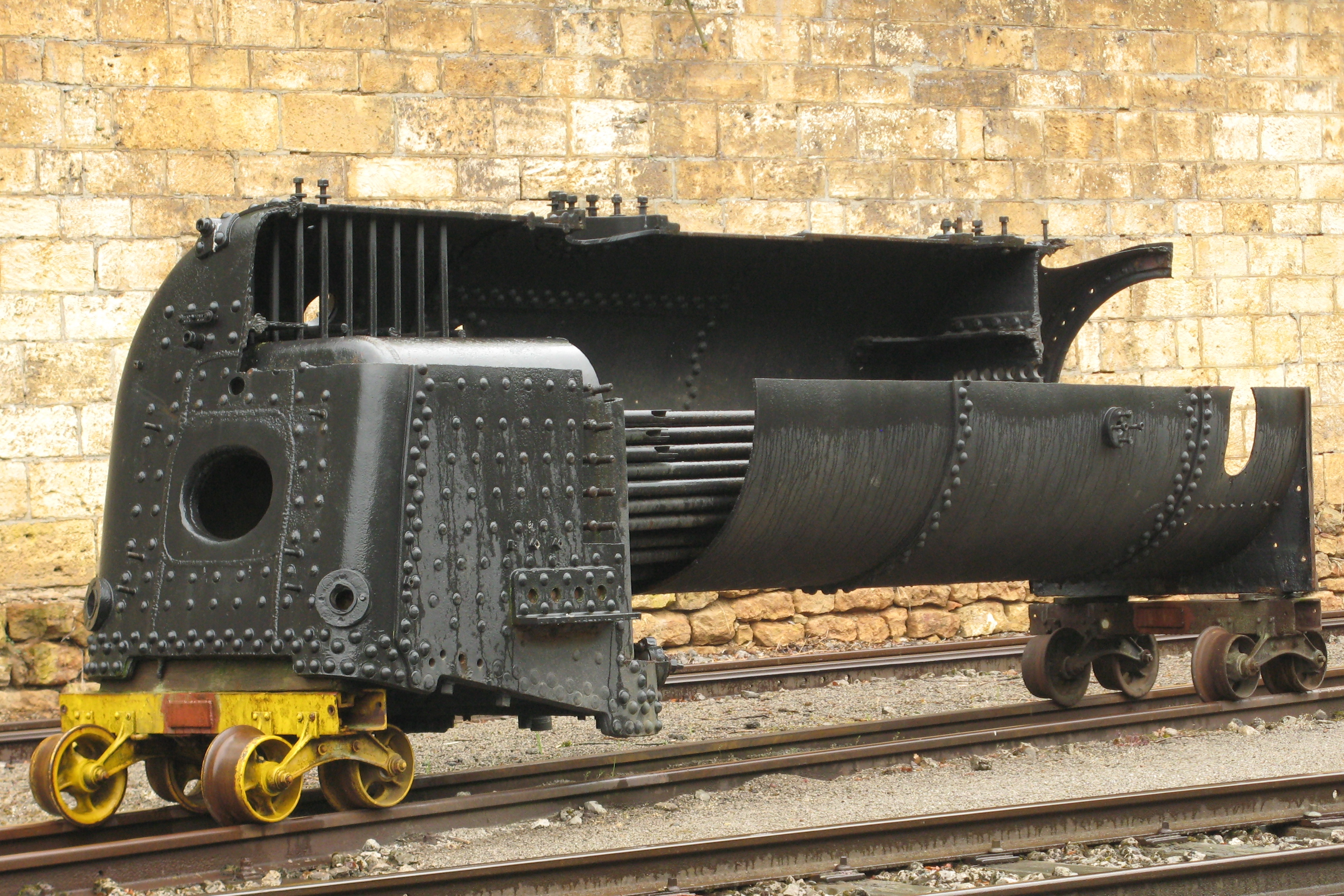 Opgeschniddene Kessel vun enger Damplokomotiv.